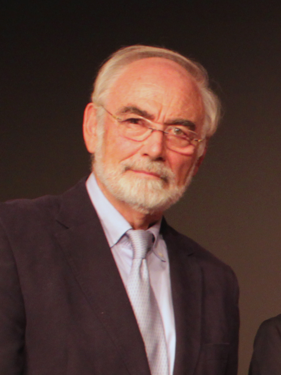 II Congreso Internacional sobre el español y la cultura hispánica en Japón / 第２回日本スペイン語・スペイン語圏文化国際会議